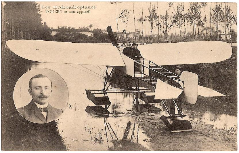 L'aviateur Victor Thouéry et son monoplan Blériot